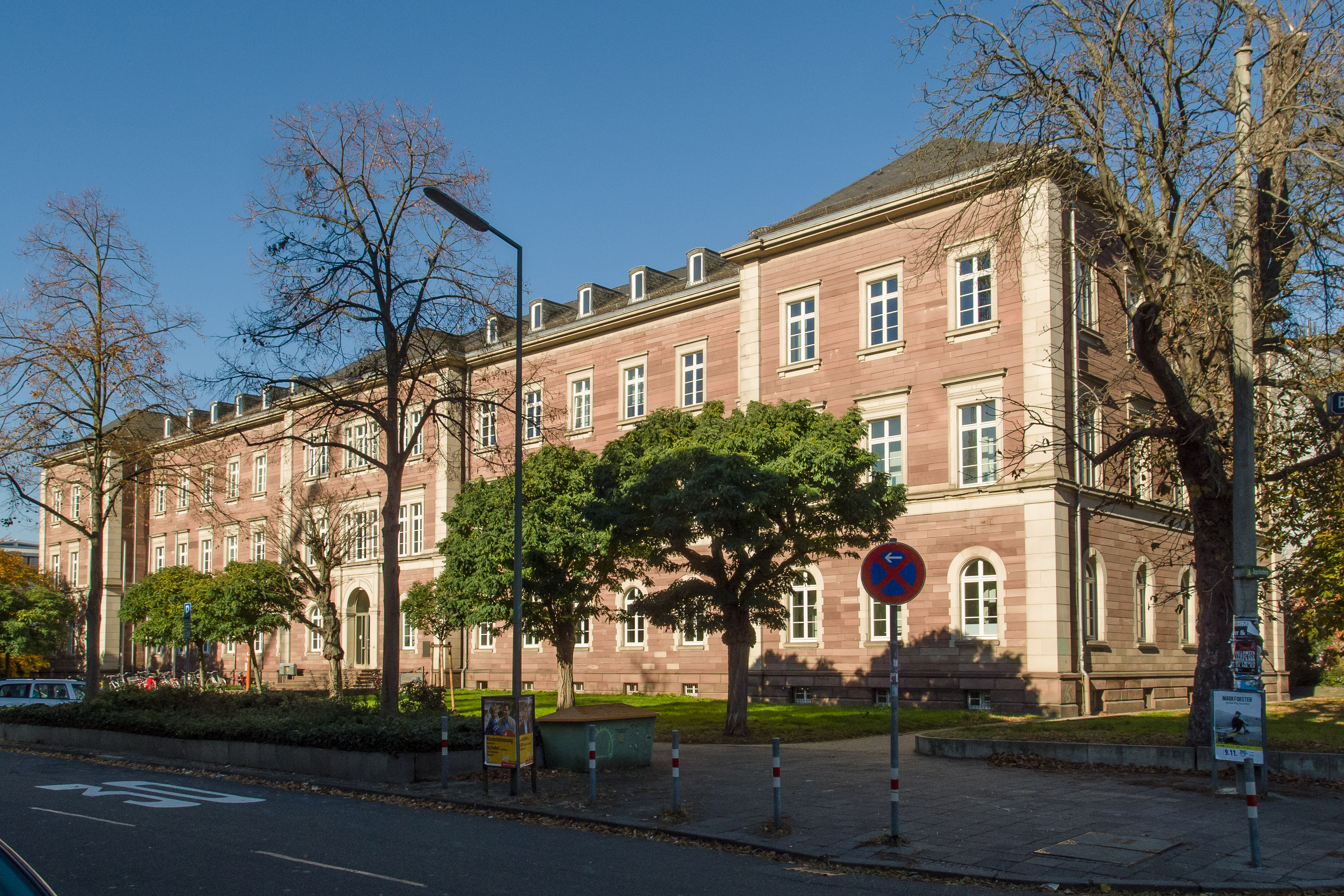 Paedagogische Hochschule Karlsruhe 2012, Bau 1 von 5